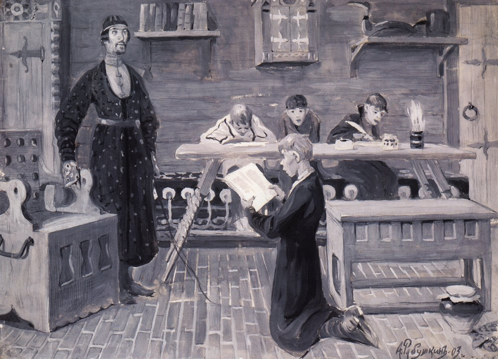 Школа XVII века. 1903. Бумага на картоне, гуашь. 43,2x60 см. Тульский областной художественный музей, Тула